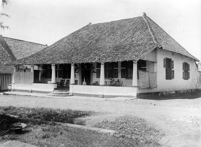 Repronegatief. Woning in koloniale stijl, Ternate